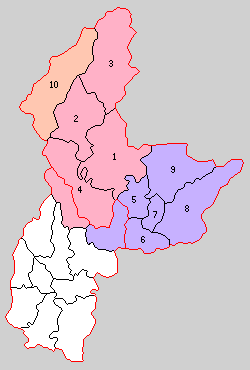 兵庫県多可郡の町村制時点の町村。